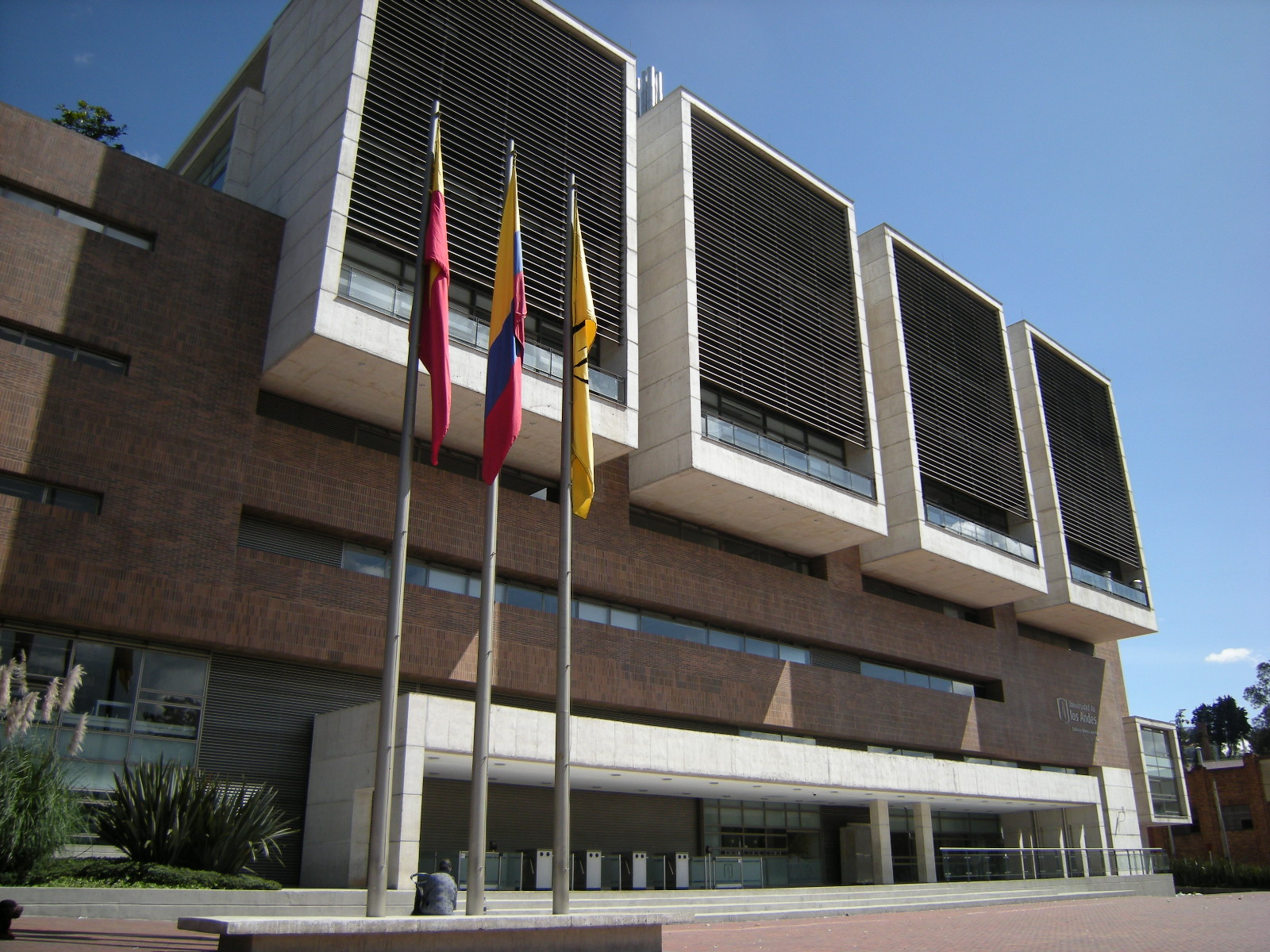 UNIANDES - Edifício Mario Laserna - Bogotá, Colombia